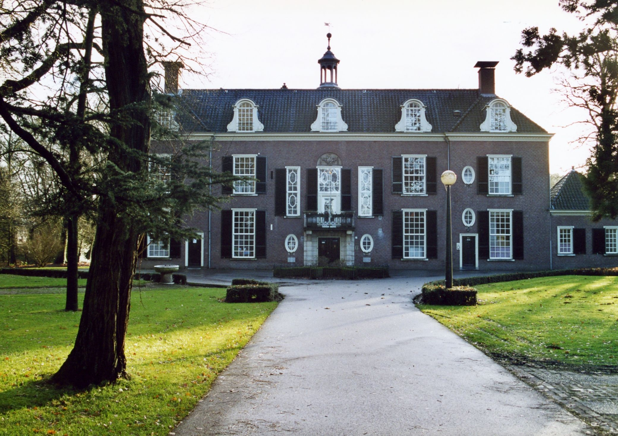 Huis Klein-Engelenburg te Brummen.